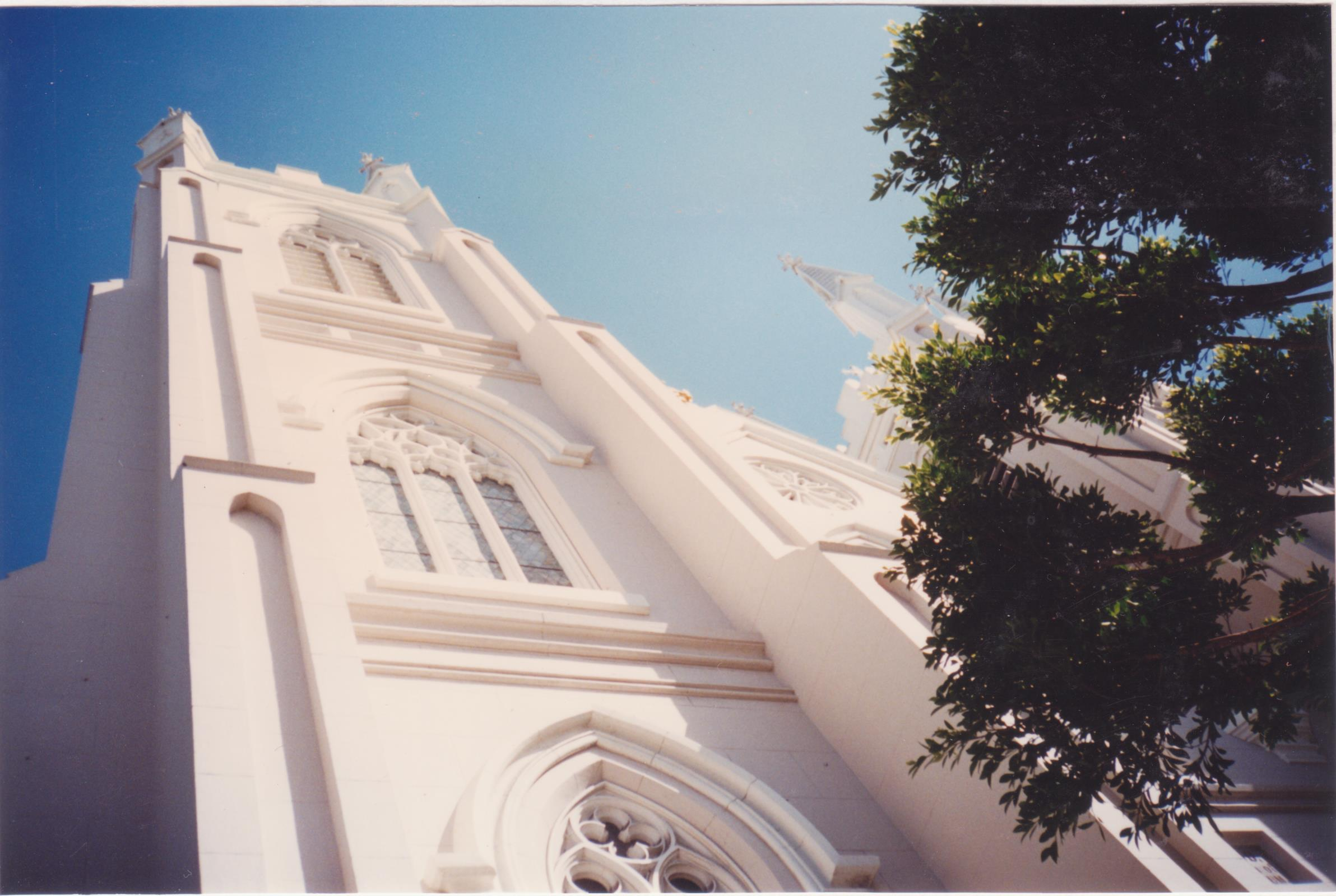 כנסיית פרנציסקוס מאסיזי, סן פרנסיסקו, קליפורניה (פרט)